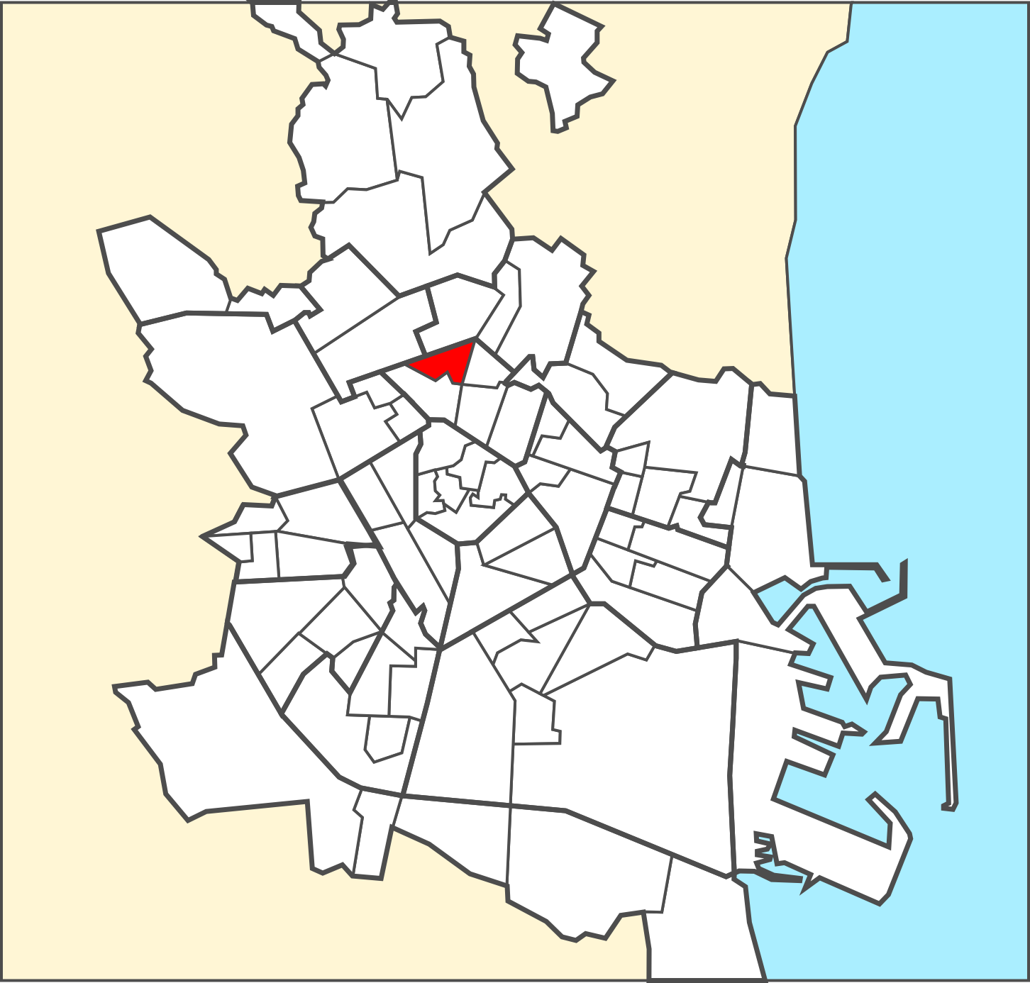 Localització del barri dins de la ciutat de València.